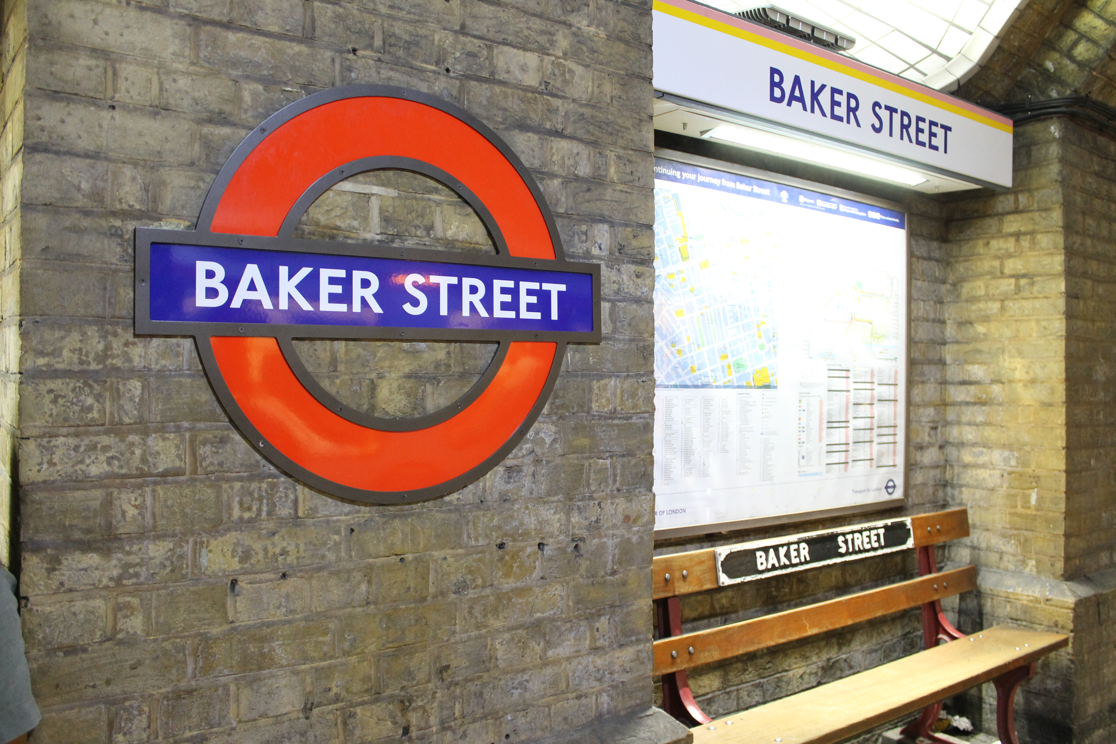 Baker Street Train Station